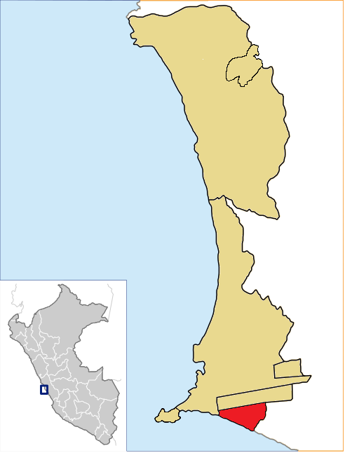 La Perla Distrito